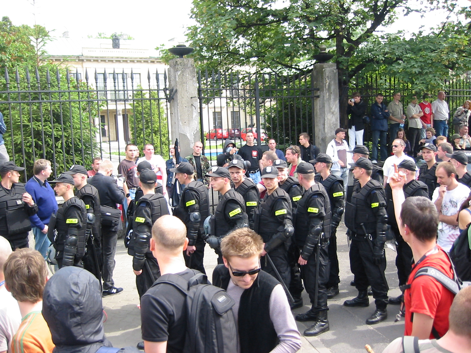 Gegendemonstranten auf der Parada Równości 2006